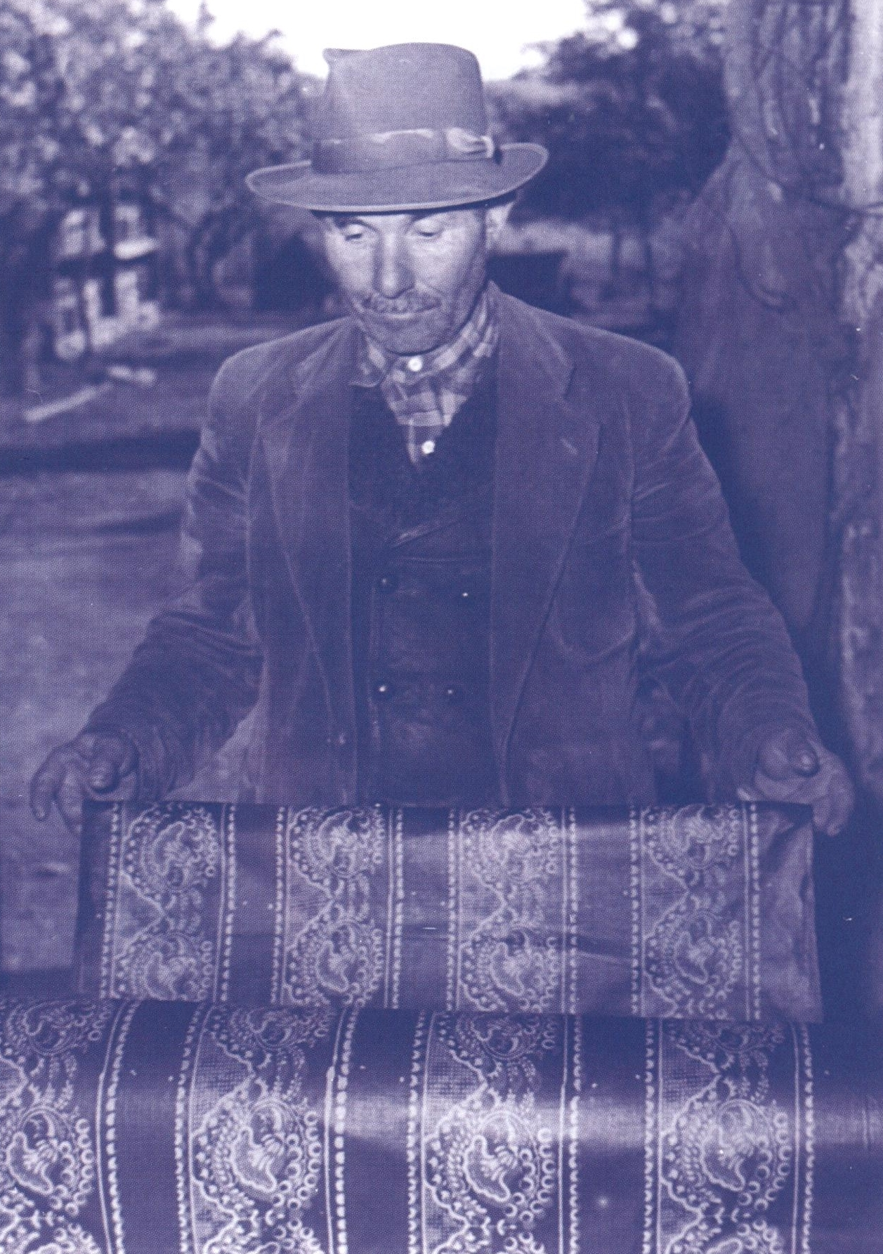 Elemír Montško pri práci s plátnom